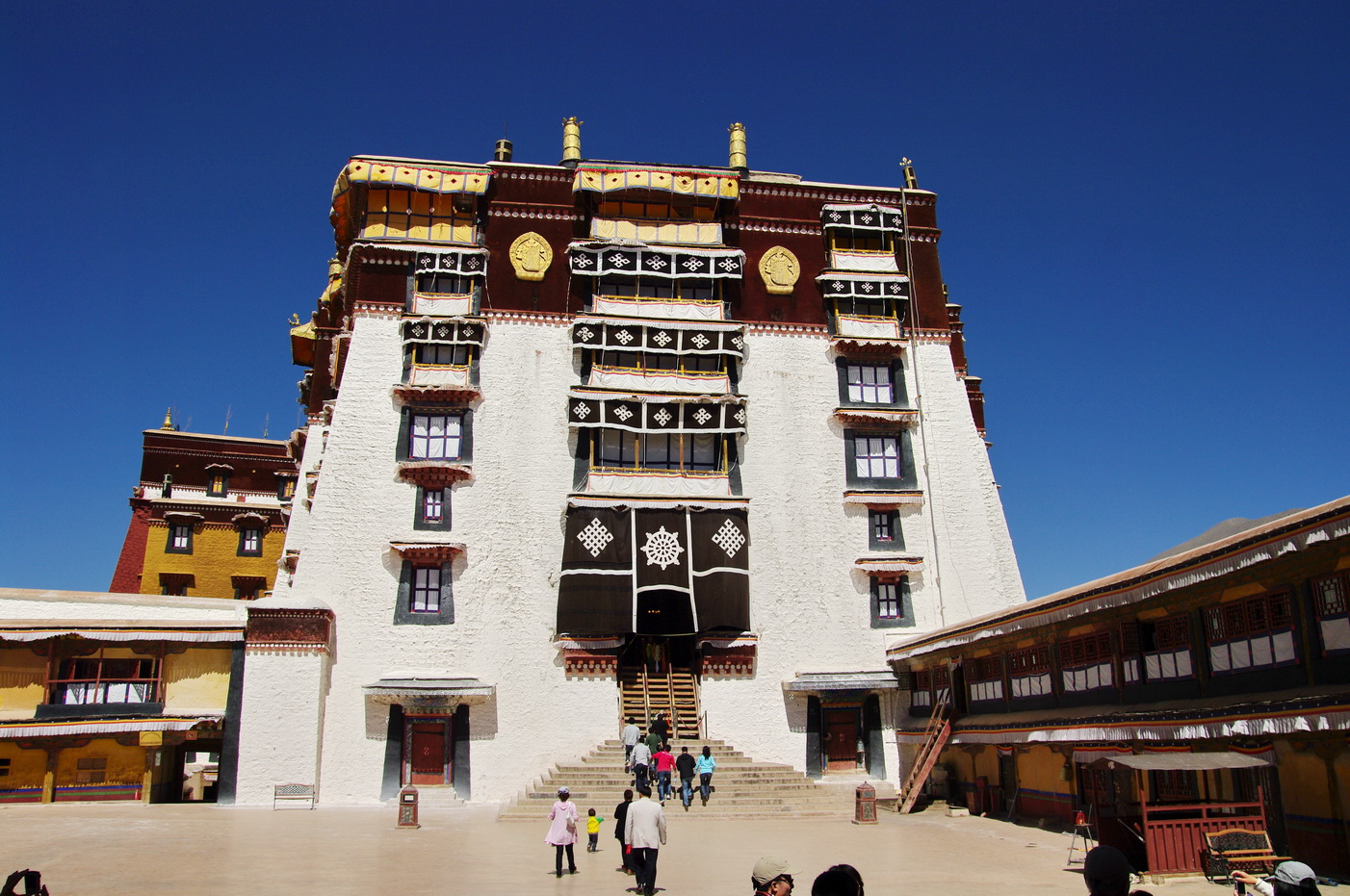 Weißer Palast Potala-Palast, Lhasa